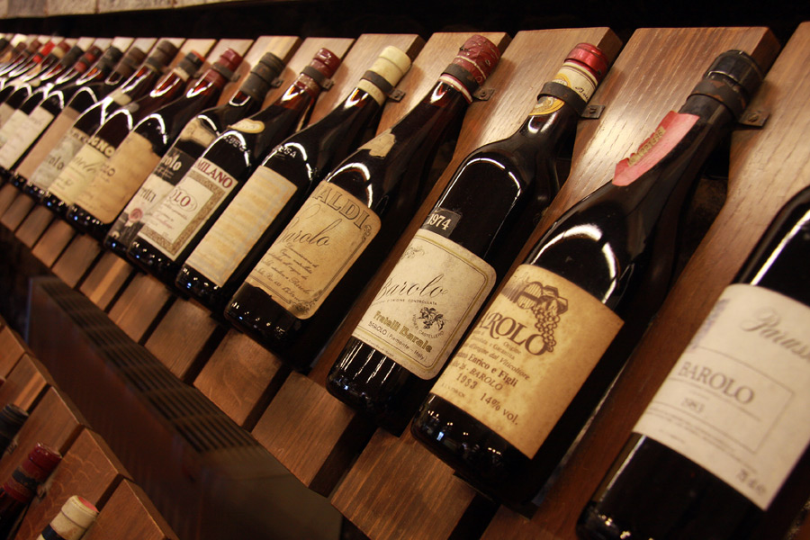 Annate storiche di vino Barolo presso l'Enoteca Regionale del Barolo nel comune omonimo (CN)